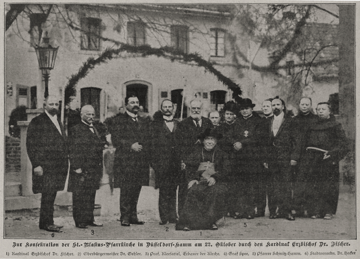 Zur Kongreation der St.-Blasius-Pfarrkirche in Düsseldorf-Hamm am 22. Oktober 1911 durch Kardinal Erzbischof Dr. Fischer1 Kardinal Erzbischof Dr. Fischer2 Oberbürgermeister Dr. Adalbert Oehler3 Prof. Kleesattel, Erbauer der Kirche 4 Graf Spee5 Pfarrer Schmitz Hamm6 Stadtverordneter Hecker